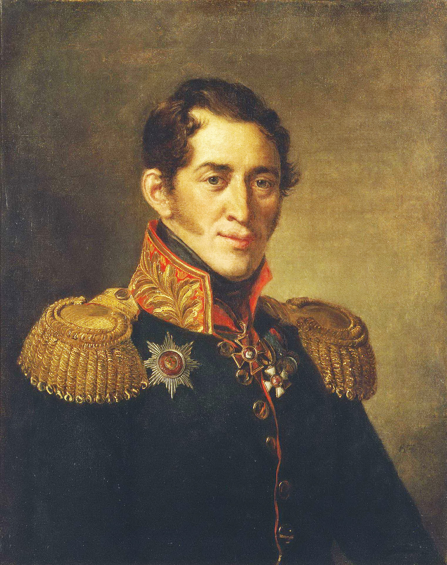 Волконский Сергей Григорьевич (князь, декабрист)